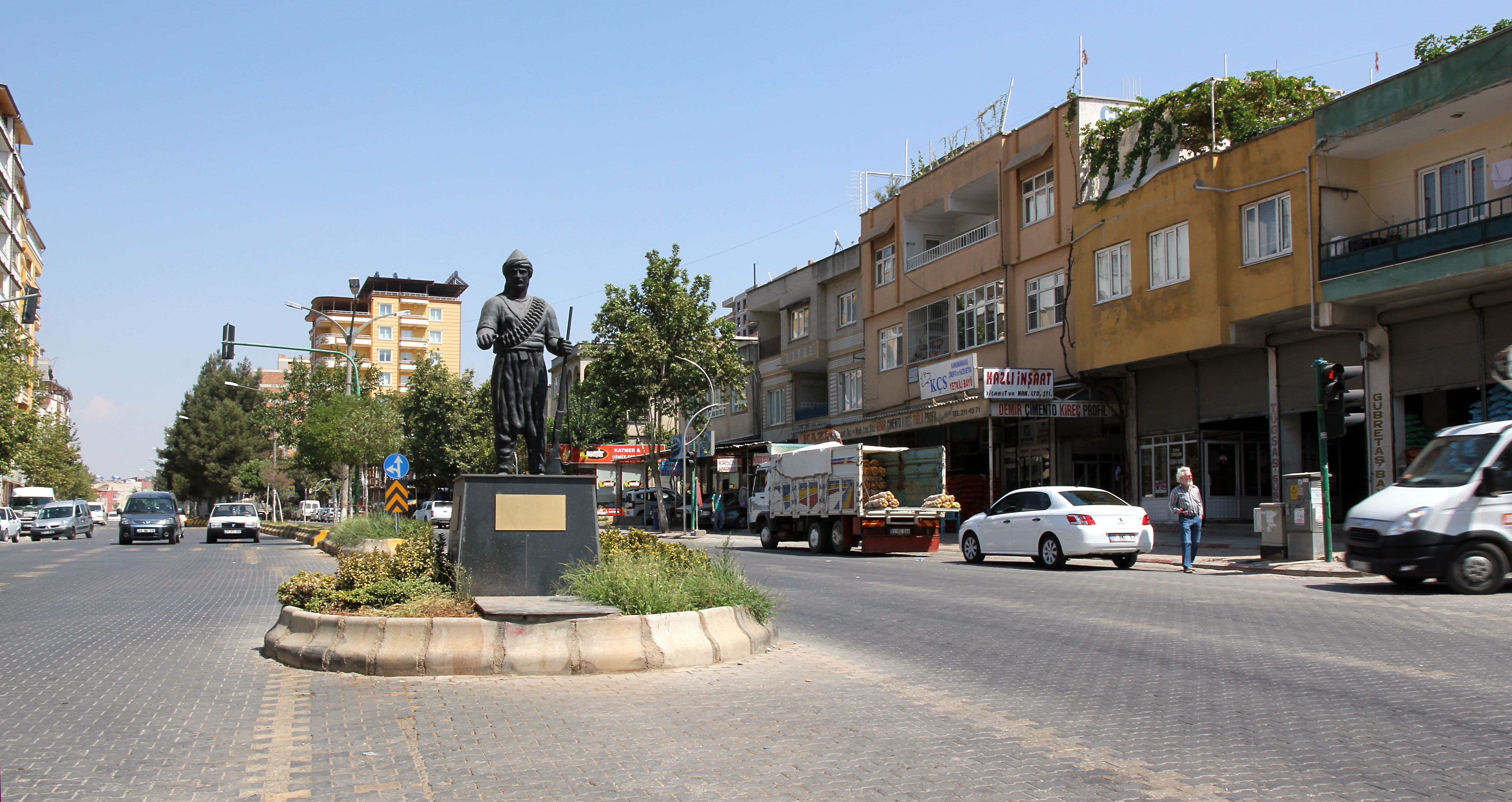 Pazarcık, Provinz Kahramanmaraş, Türkei, Denkmal des Lokalhelden Molla Mehmet Karayılan